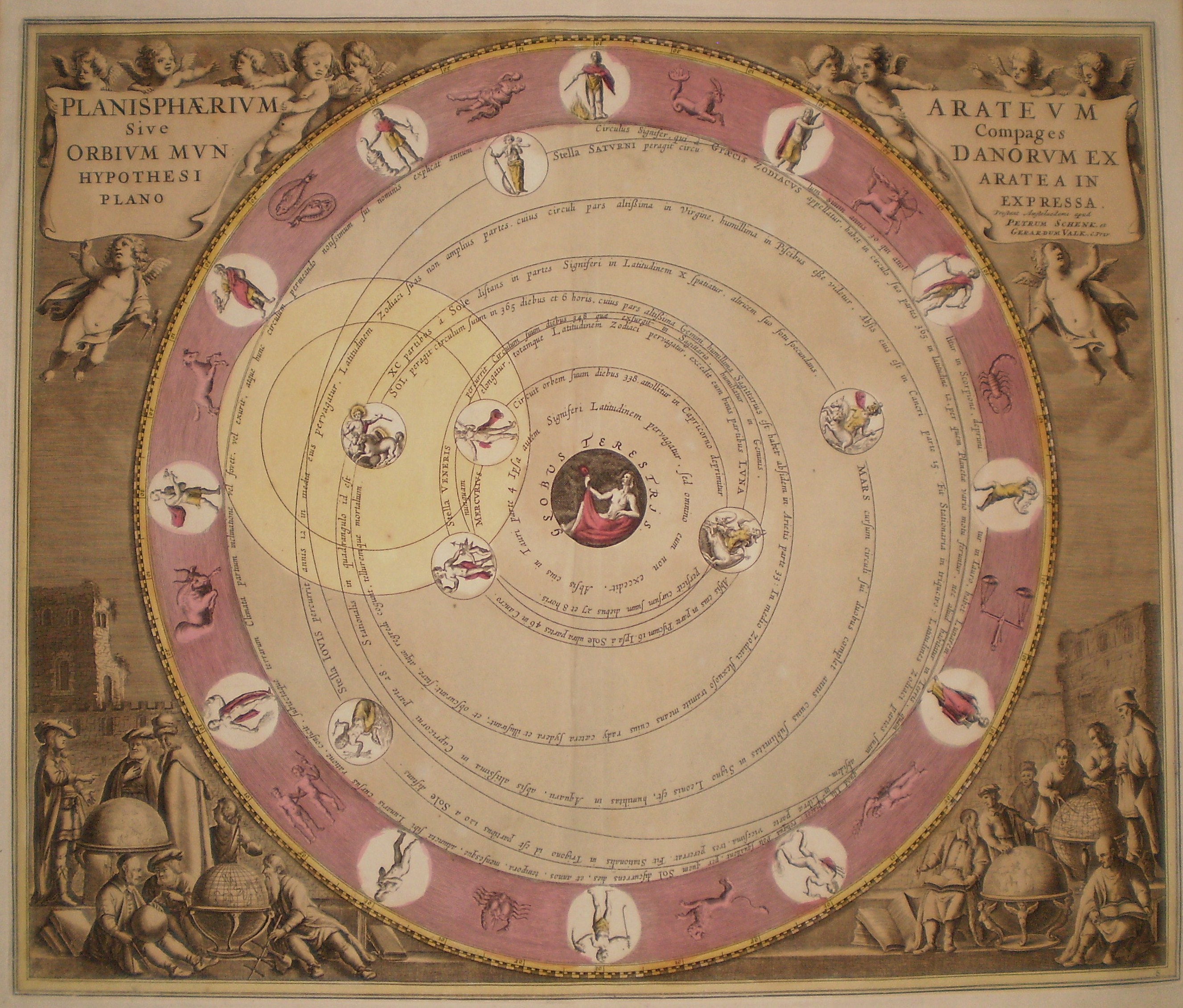 Mappa geocentrica delle orbite di alcuni corpi celesti. Dalla collezione della libreria antiquaria Bourlot - Torino